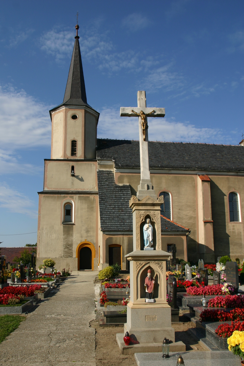 Biała (dodatkowa nazwa w j. niem. Zülz) – to miasto w woj. opolskim, w powiecie prudnickim.